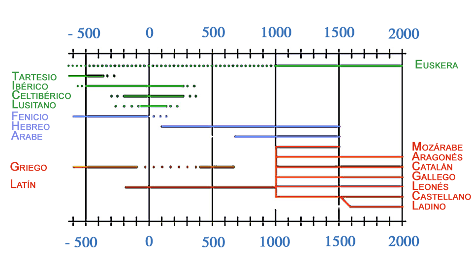 Cronología de los idiomas más importantes de la península ibérica.